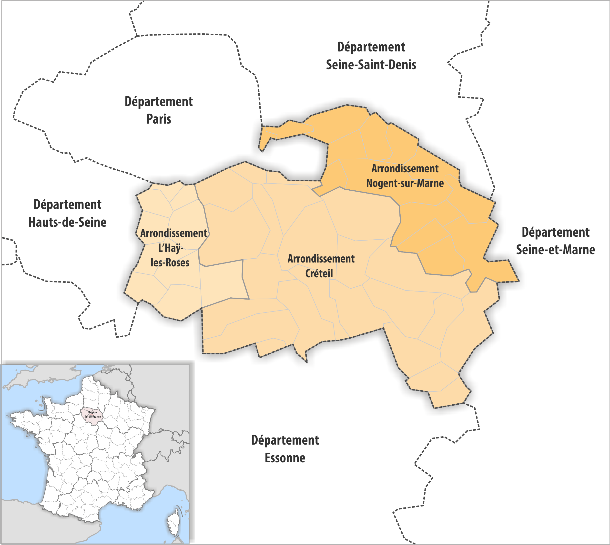 Gemeinden und Arrondissemente im Departement Val-de-Marne